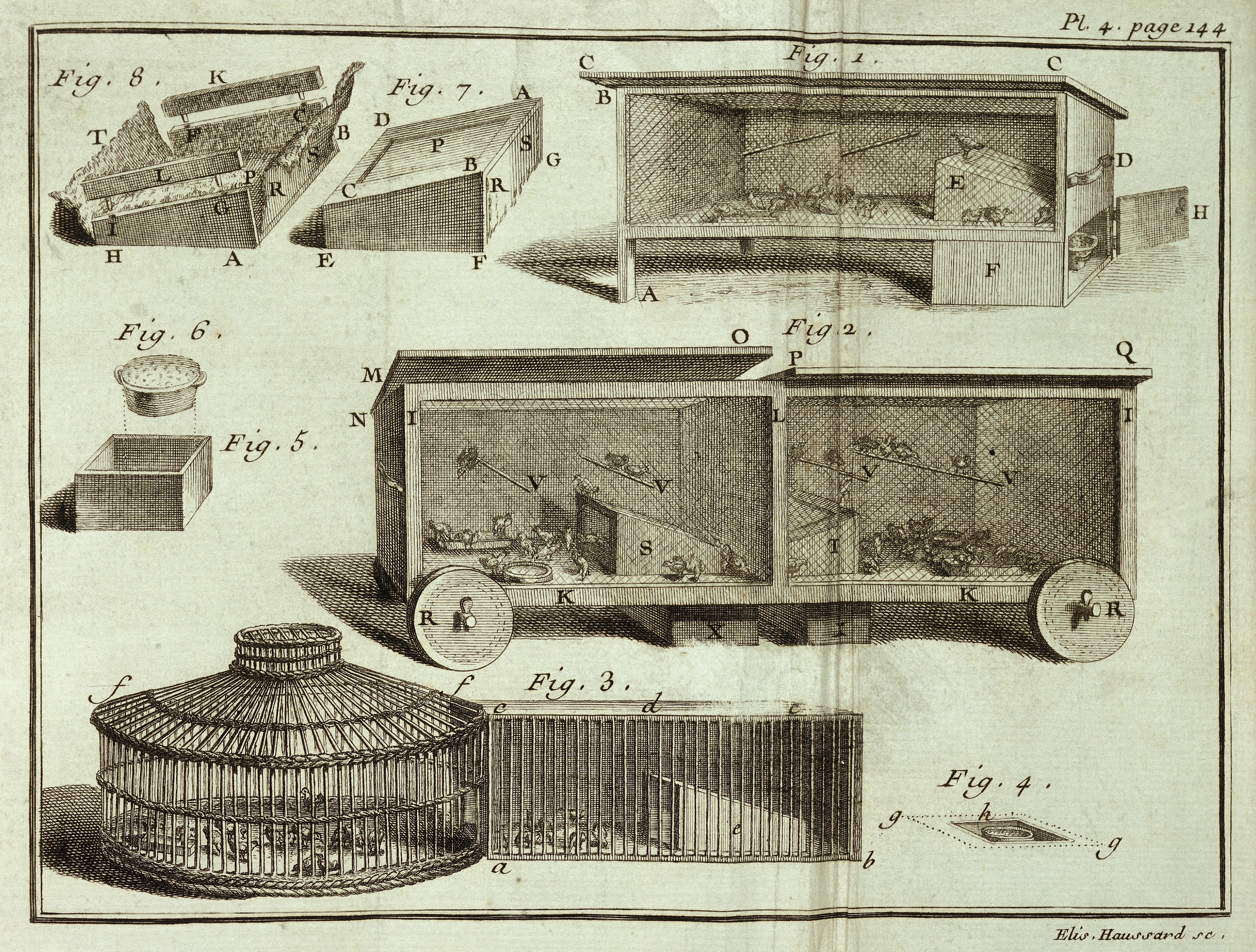 REAUMUR, René-Antoine Ferchault de { 1683-1757} R.A.F de Reaumur, Pratique de l'art de faire éclorre et d'élever en toute saison des oiseaux domestiques. De toutes especes, soit par le moyen de la chaleur du fumier, soit par le moyen de celle du feu ordinaire.Paris : Imprimerie royale, 1751. Page 144, plate 4: Poultry: raising chicks with artificial mothers in cages Rare Books Keywords: Poultry; reaumur, renÉ-antoine ferchaul; 1683-1757; epb 43269/a